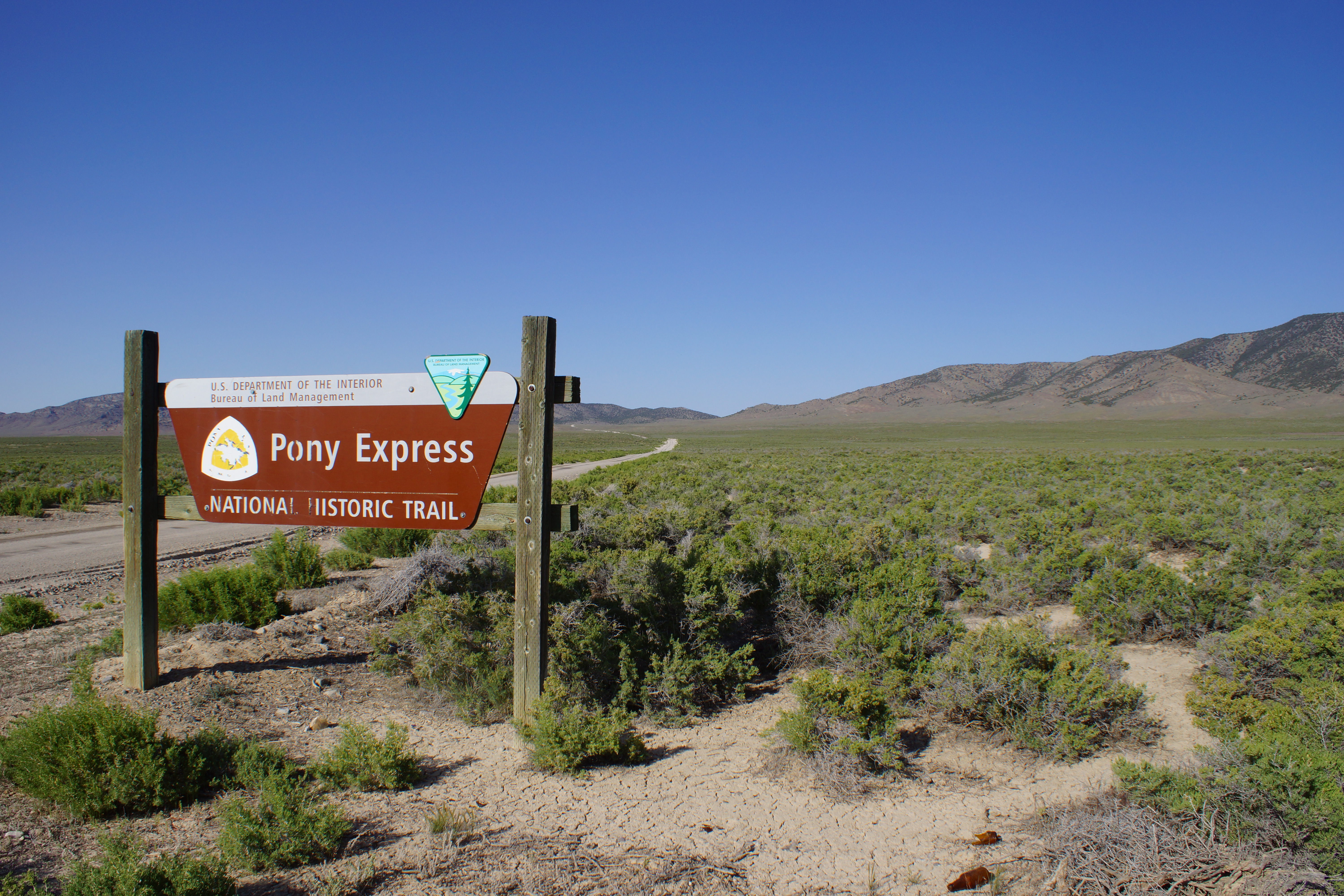 2014, Pony Express